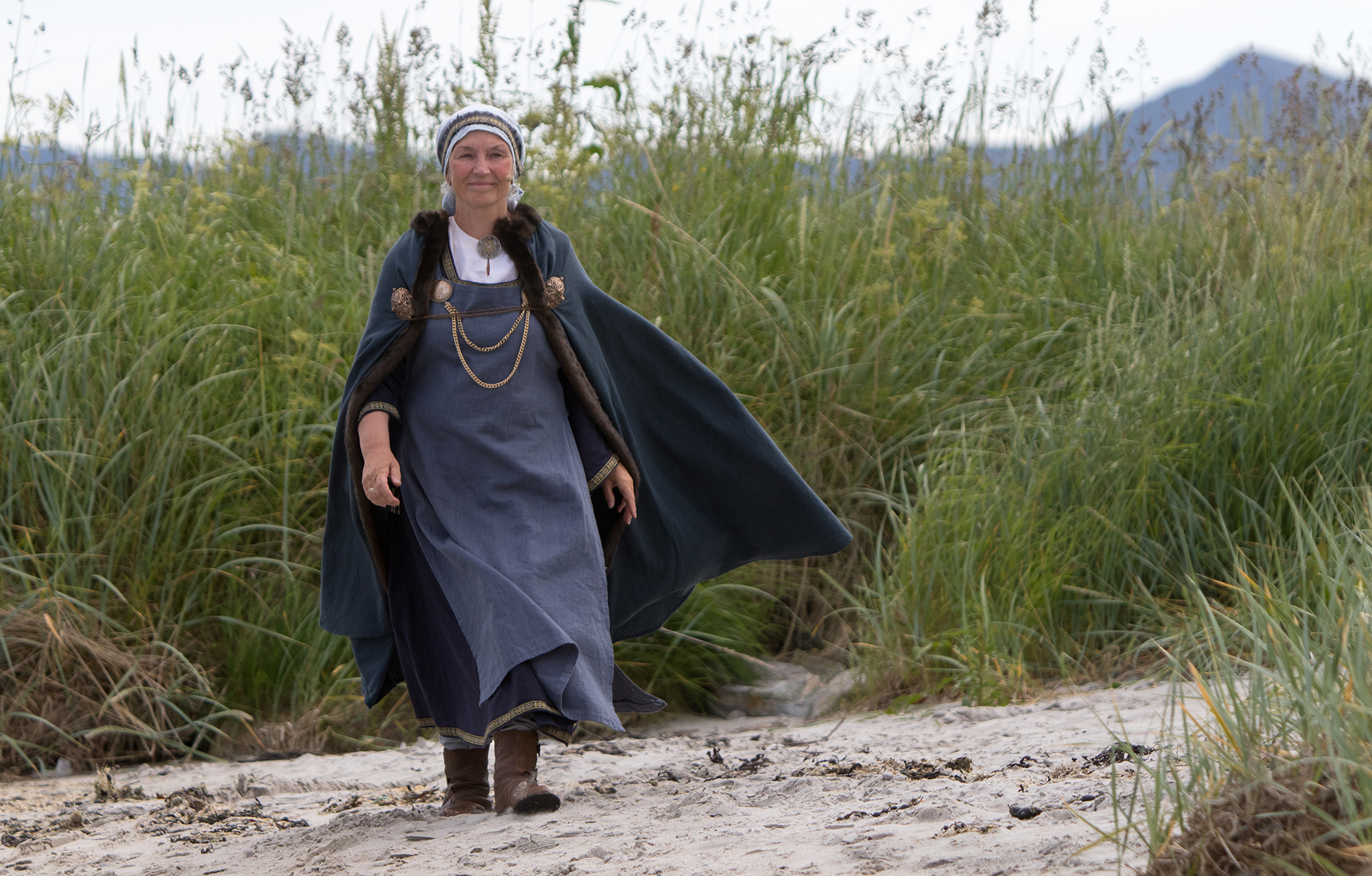 Sylvia Salvesen - i rollen som Fru Guri av Edøy under Gurispelet 2015.